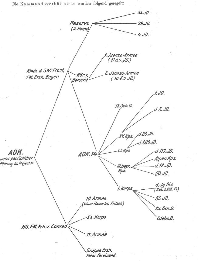 12. Isonzoschlacht - Kommandoverhältnisse